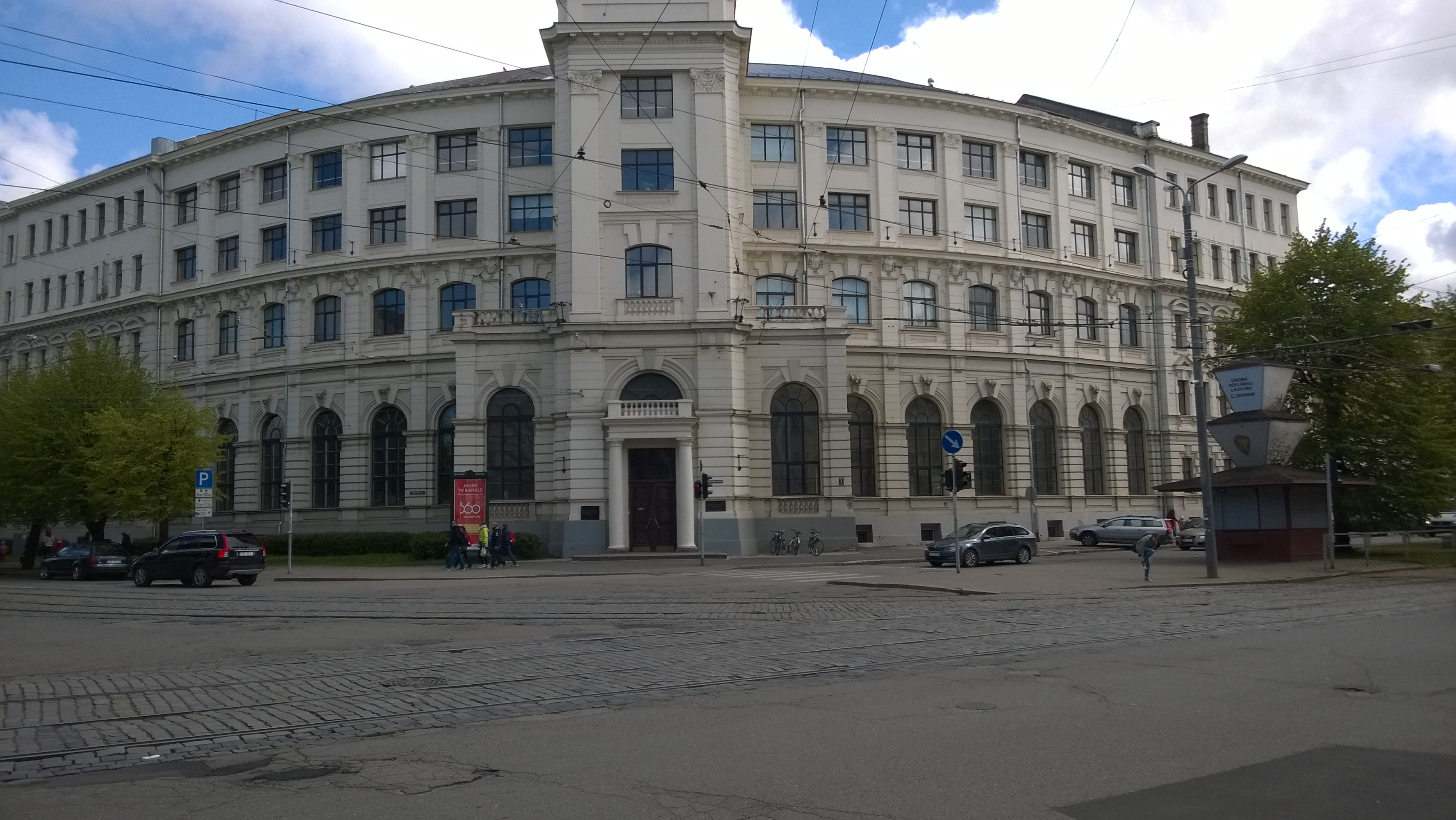 Latvian yliopiston taloustieteen ja johtamistaidon tiedekunta